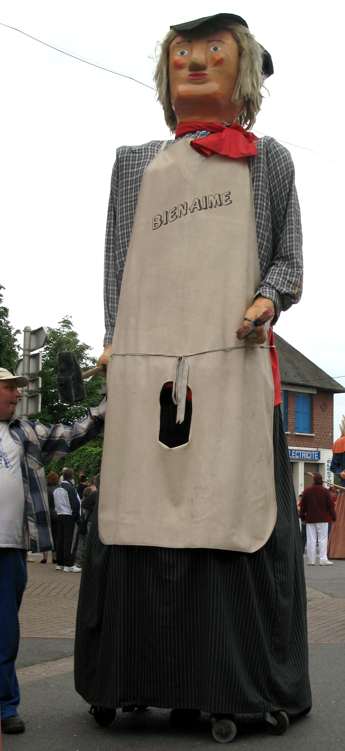 Ham (Somme, France) - Animation festive au centre-ville, un dimanche de printemps. Le géant Bienaimé (dans la rue de Noyon ?). On remarque nettement les roulettes et les pieds de la personne installée dans le "panier".